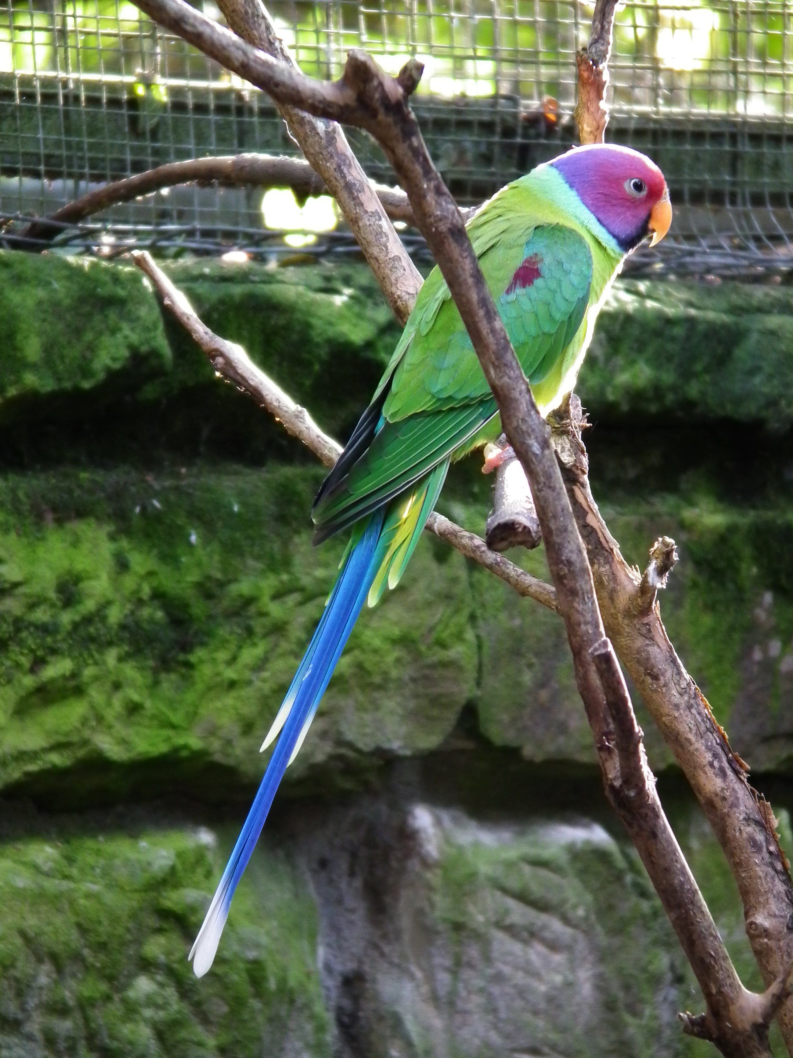 Pflaumenkopfsittich (Psittacula cyanocephala) im Leintalzoo in Schwaigern (Baden-Württemberg, Deutschland)